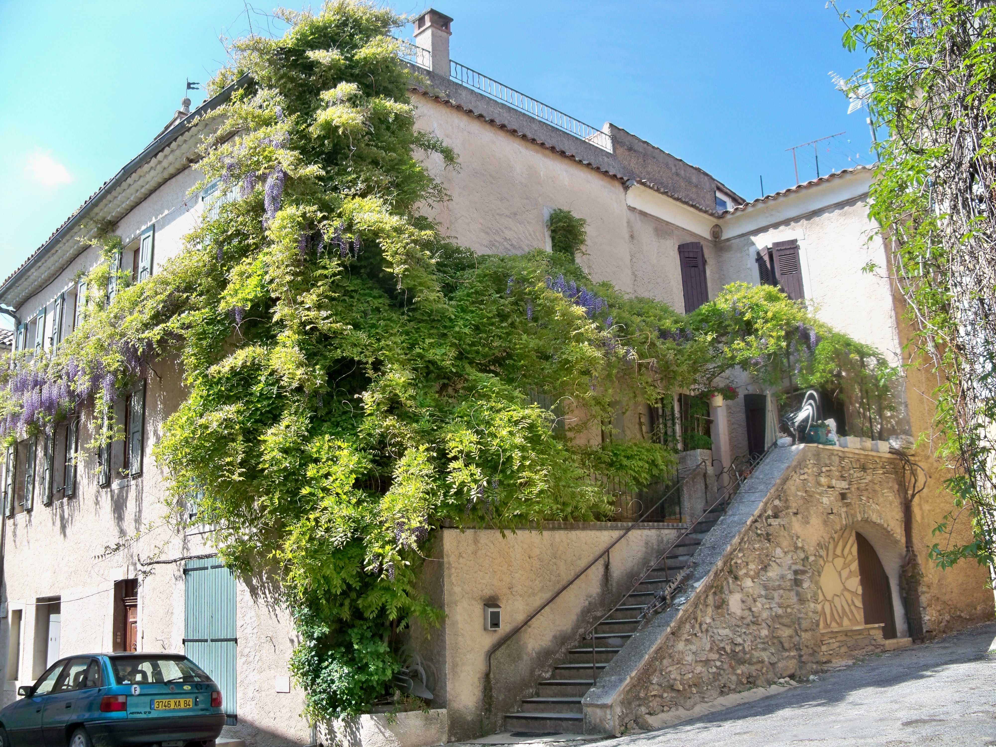 Habitat à Saint Etienne les Orgues